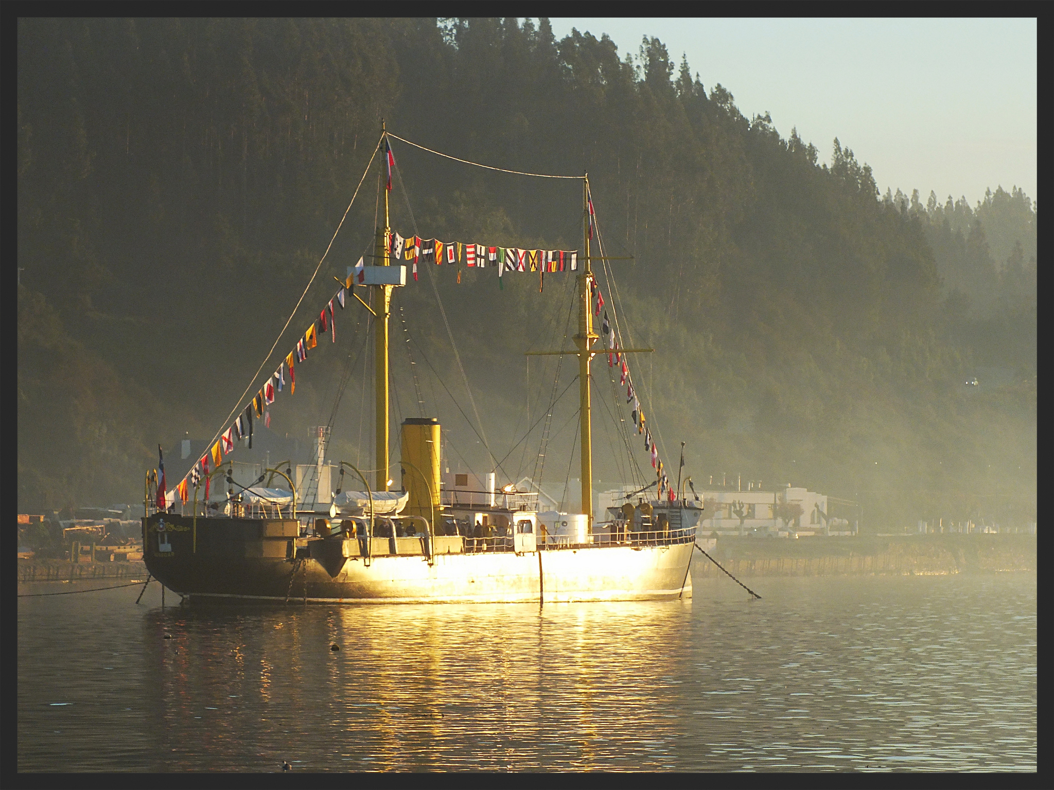 Museo Flotante Monitor Huáscar en la Base Naval de Talcahuano